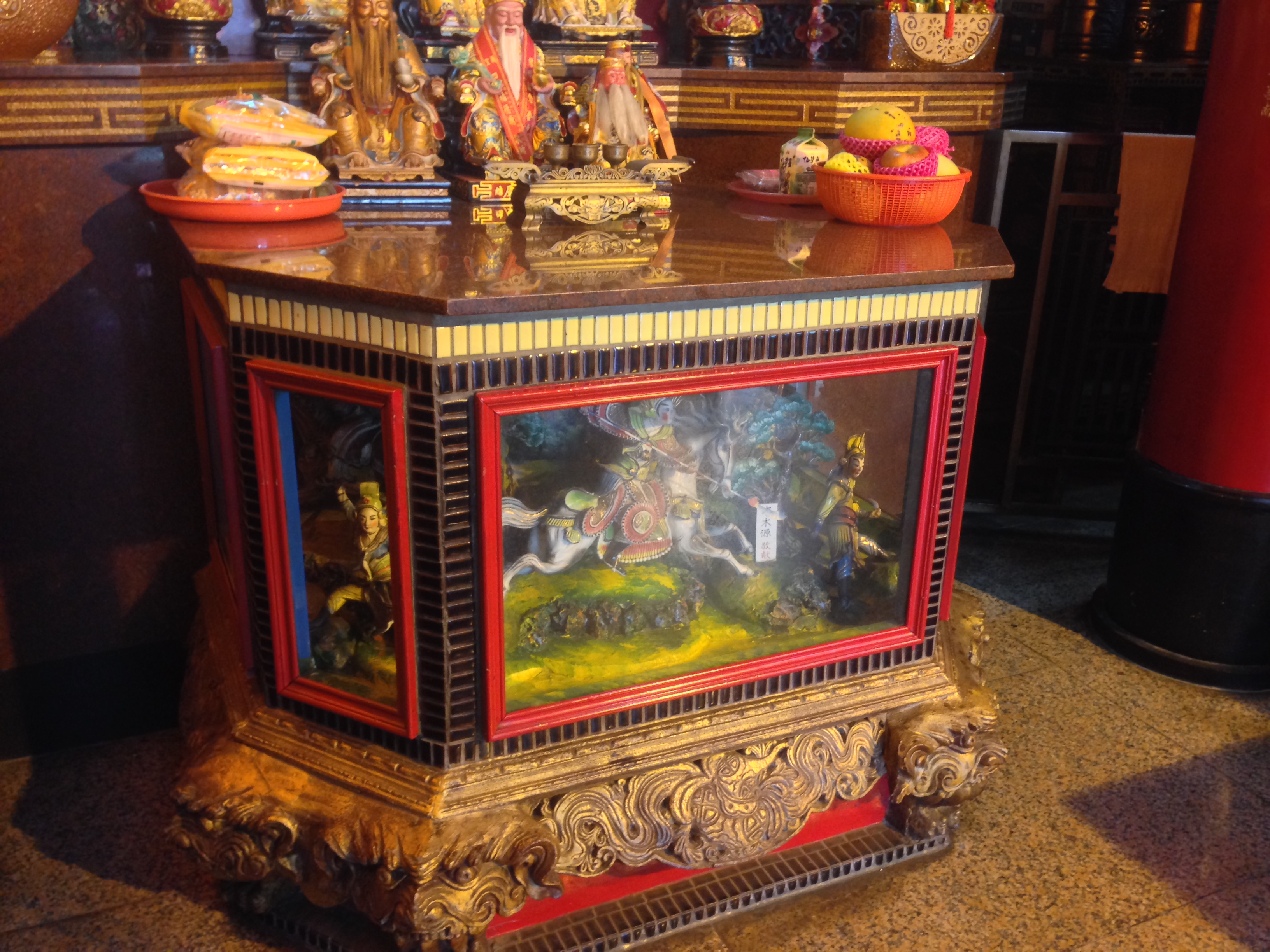 中文（台灣）: 四結福德廟交趾陶